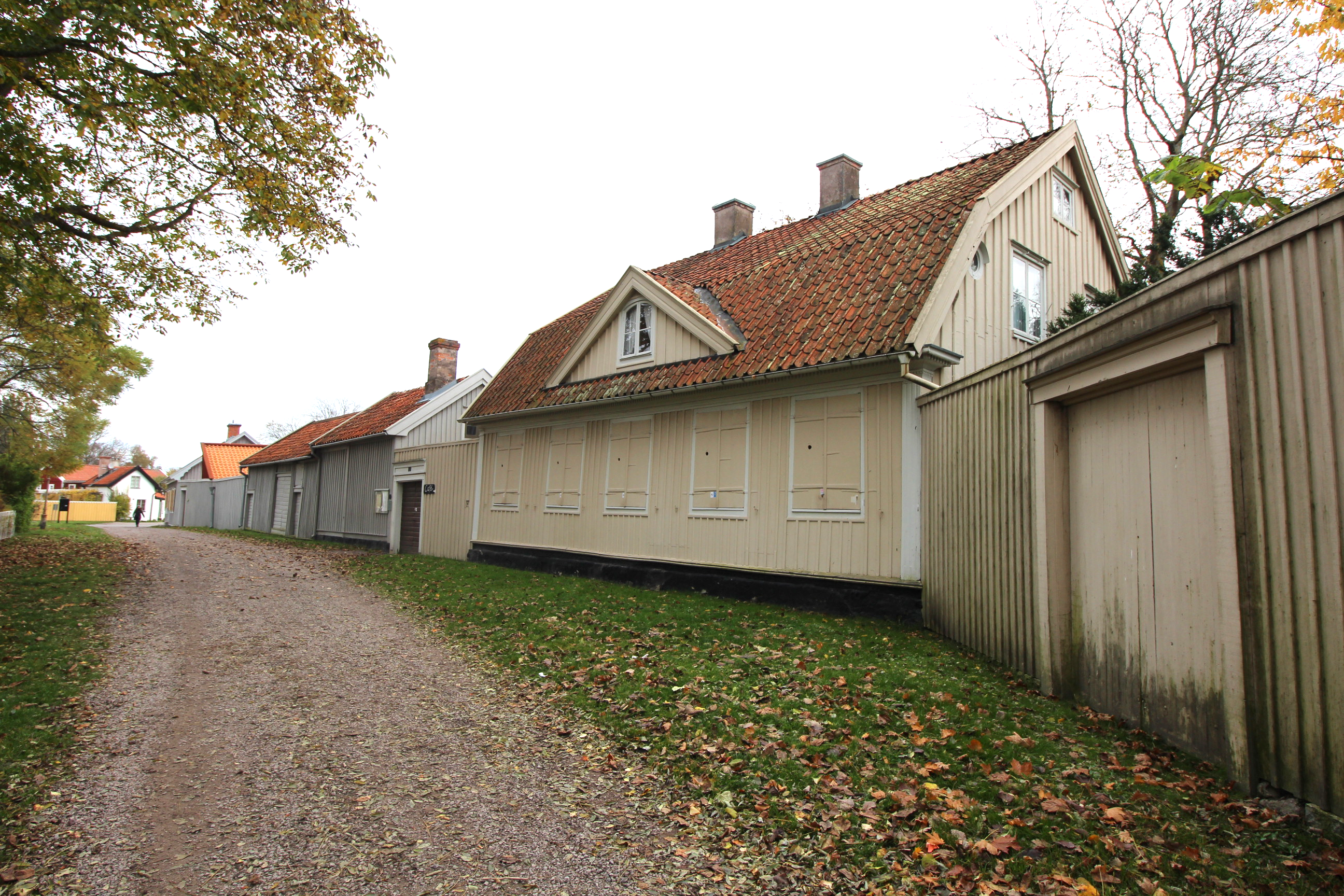 Krusenstiernska gården, Gamla stan, Kalmar, är ett borgarhem från 1800-talet. Namnet härrör från släkten Krusenstierna, gårdens ägare mellan 1874 och 1915. Gården blev byggnadsminne 1985.